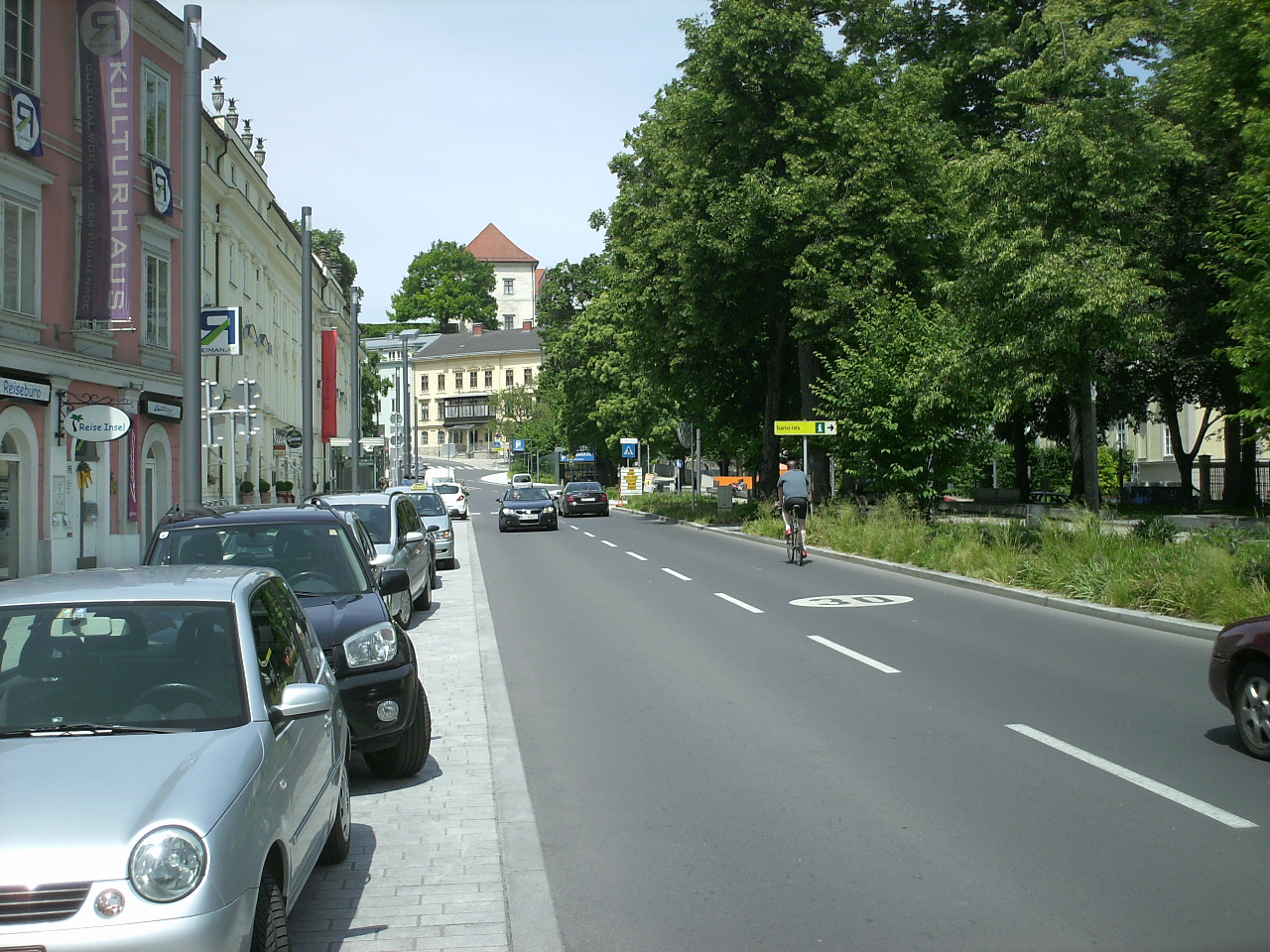 Straßenzug Promenade in Linz/OÖ, Blick Richtung Landestheater, die Nordflanke des ehem. Kastell Lentia.